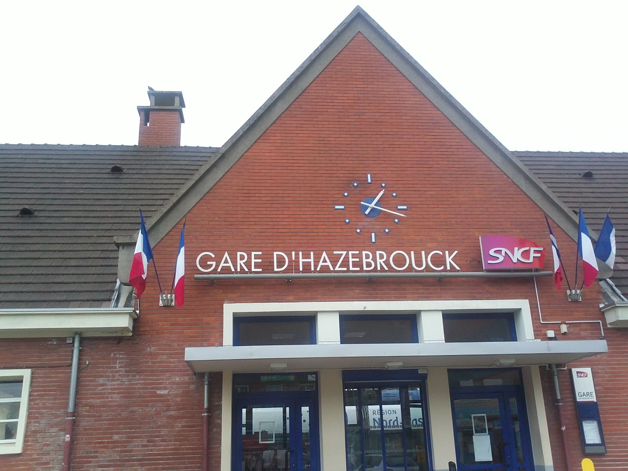 Gare d'Hazebrouck